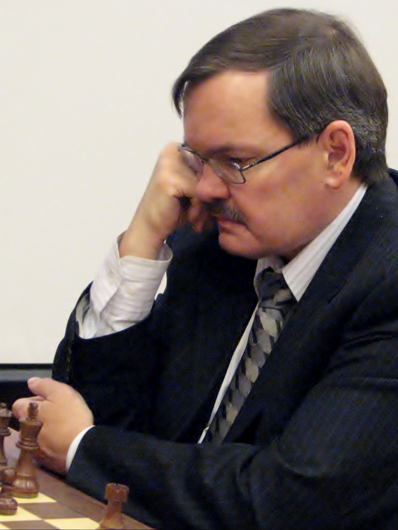 Jaan Ehlvest kiirmaleturniiril "Meenutades Paul Kerest"